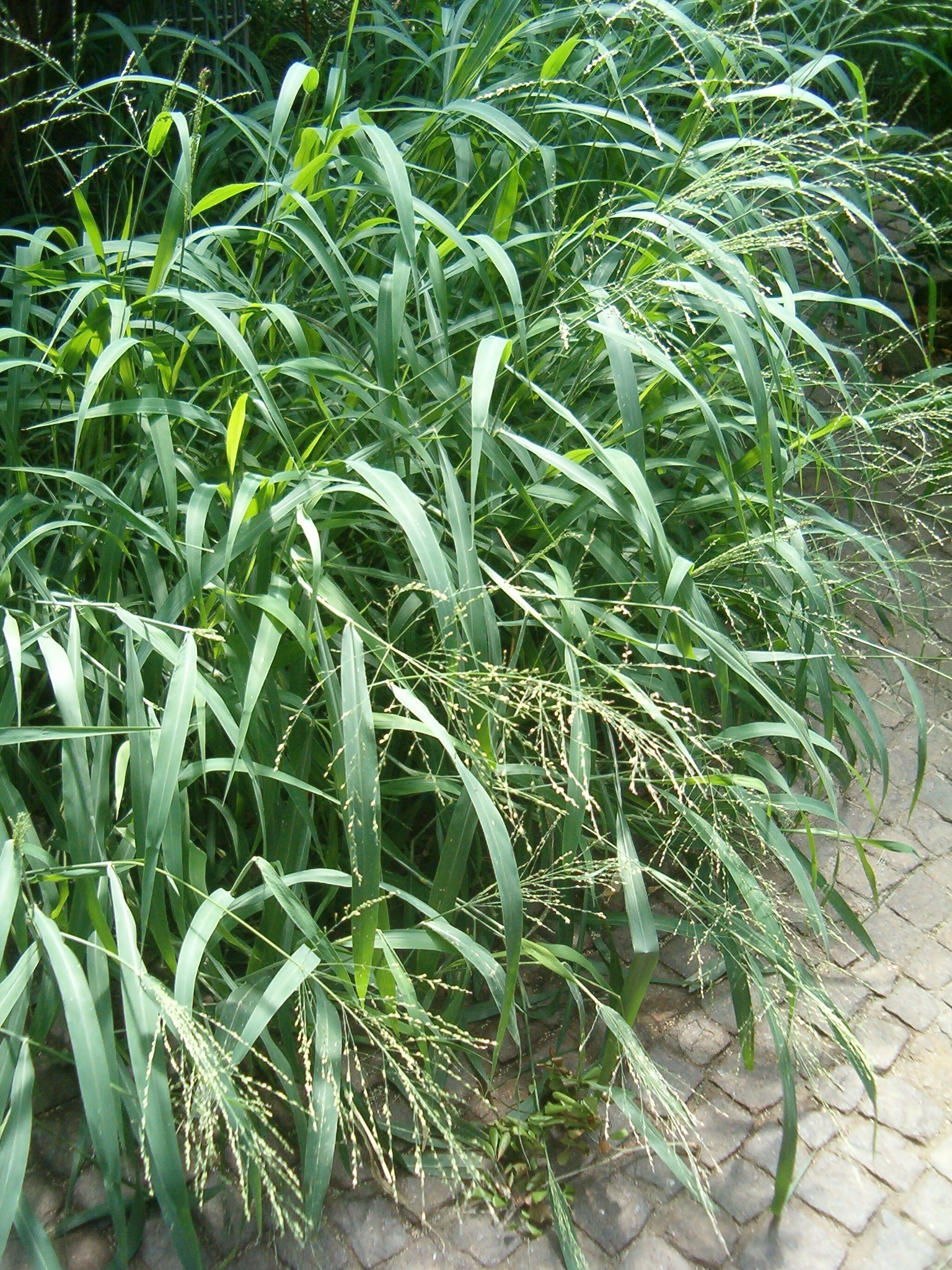 At Botanical Gardens Berlin-Dahlem Species Panicum maximum